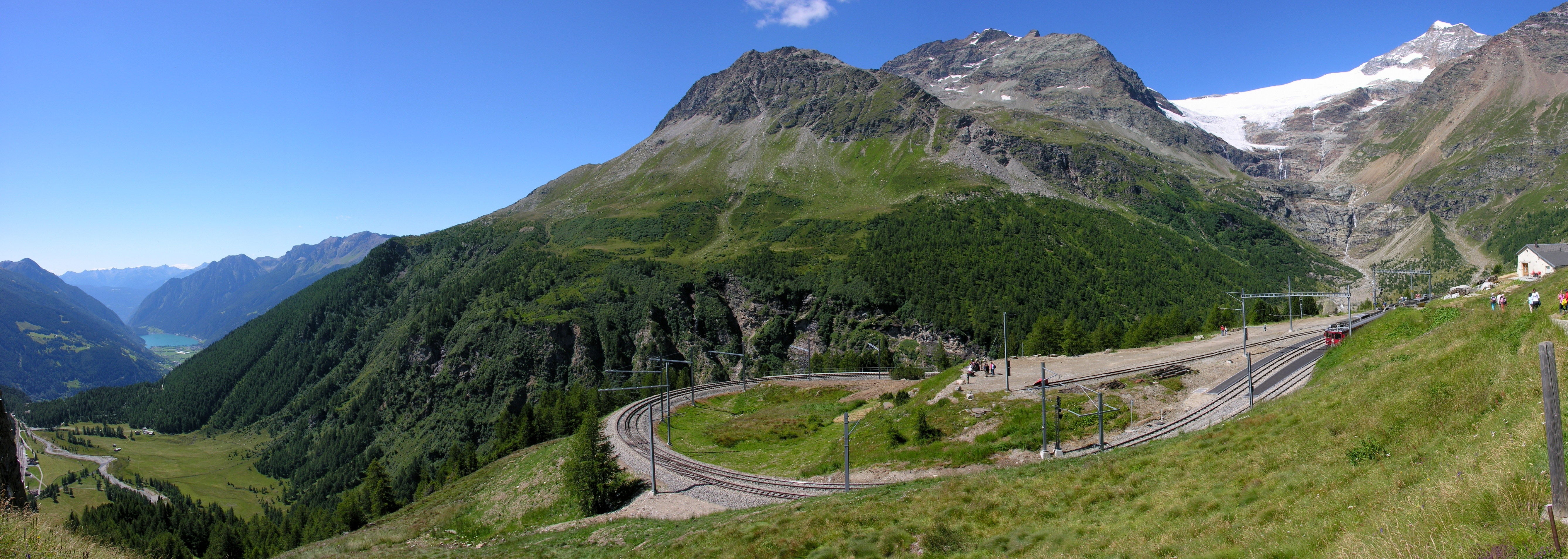 Alp Grüm, Switzerland